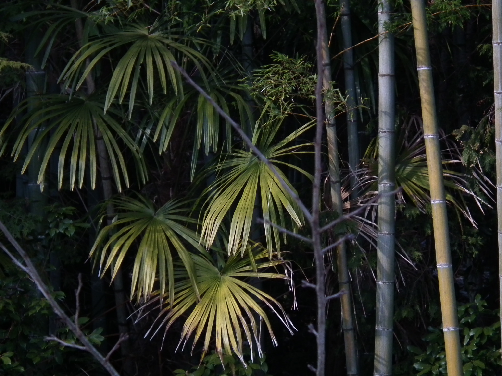 野生化し竹林に自生する棕櫚